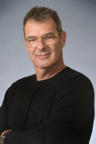 יוני סער